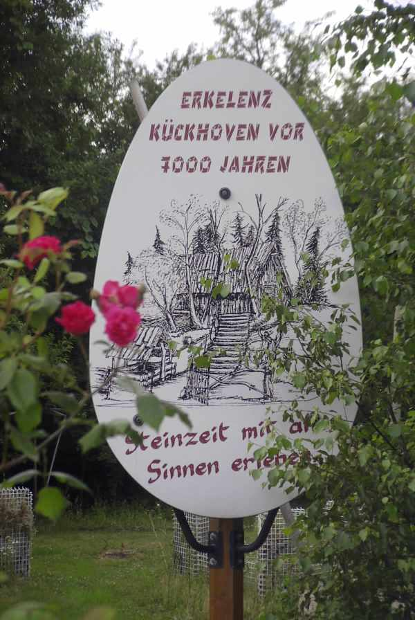 Summary Bildbeschreibung: Lahey-Park Erkelenz, Hinweis auf jungsteinzeitliche Erlebniswelt (öffentliche Werbetafel am Eingang) Quelle: eigenes Foto Fotograf/Zeichner: bodoklecksel 16:31, 26. Jun 2006 (CEST). Datum: Juni 2006 Sonstiges